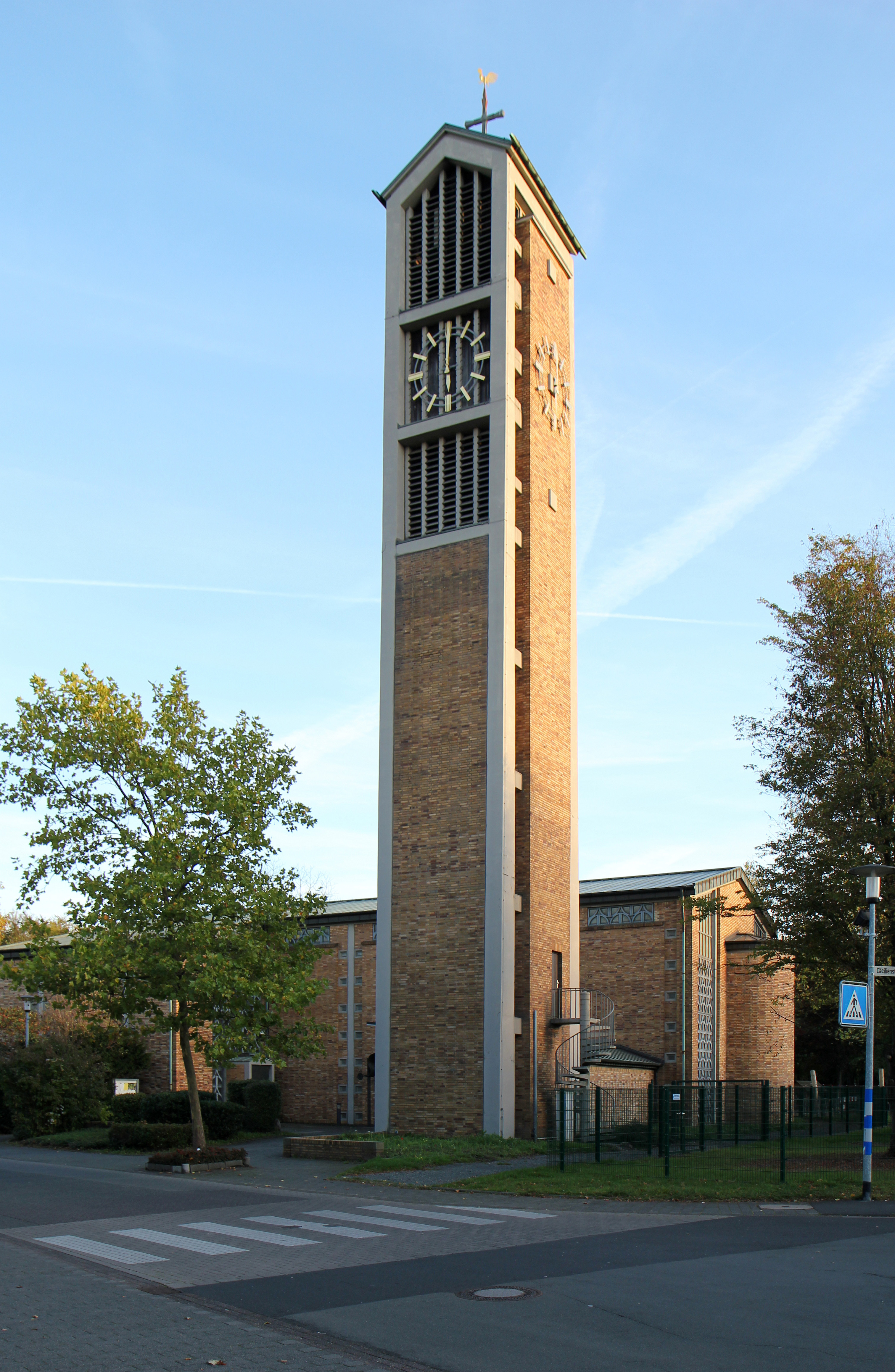 St. Wendelinus, Hürth-Berrenrath